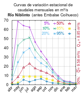 Curva de variación estacional del río Niblinto antes del Embalse Coihueco. # Dirección General de Aguas # Diagnóstico y clasificación de los cursos y cuerpos de agua según objetivos de calidad. Cuenca del río Itata. # Santiago de Chile # Ministerio de Obras Públicas (Chile) # 2004 # url: # urlarchivo: # Tabla 4.4: Río Niblinto antes embalse Coihueco (m3/s) pág. 44 mes 5% 10% 20% 50% 85% 95% abr 16.370 10.171 5.748 2.001 0.640 0.385 may 68.732 43.056 24.434 8.275 2.181 0.996 jun 64.121 48.845 35.130 18.711 8.613 5.460 jul 62.656 51.297 39.719 22.857 8.954 3.253 ago 46.332 37.793 29.363 17.682 8.736 5.309 sep 35.995 29.706 23.541 15.092 8.728 6.328 oct 27.810 23.974 19.795 13.043 6.549 3.486 nov 16.919 15.261 13.254 9.417 4.691 1.915 dic 9.638 8.017 6.406 4.150 2.396 1.715 ene 4.225 3.496 2.779 1.792 1.044 0.760 feb 3.412 2.537 1.800 0.998 0.571 0.455 mar 1.759 1.526 1.283 0.916 0.590 0.442 This plot was created with Gnuplot.